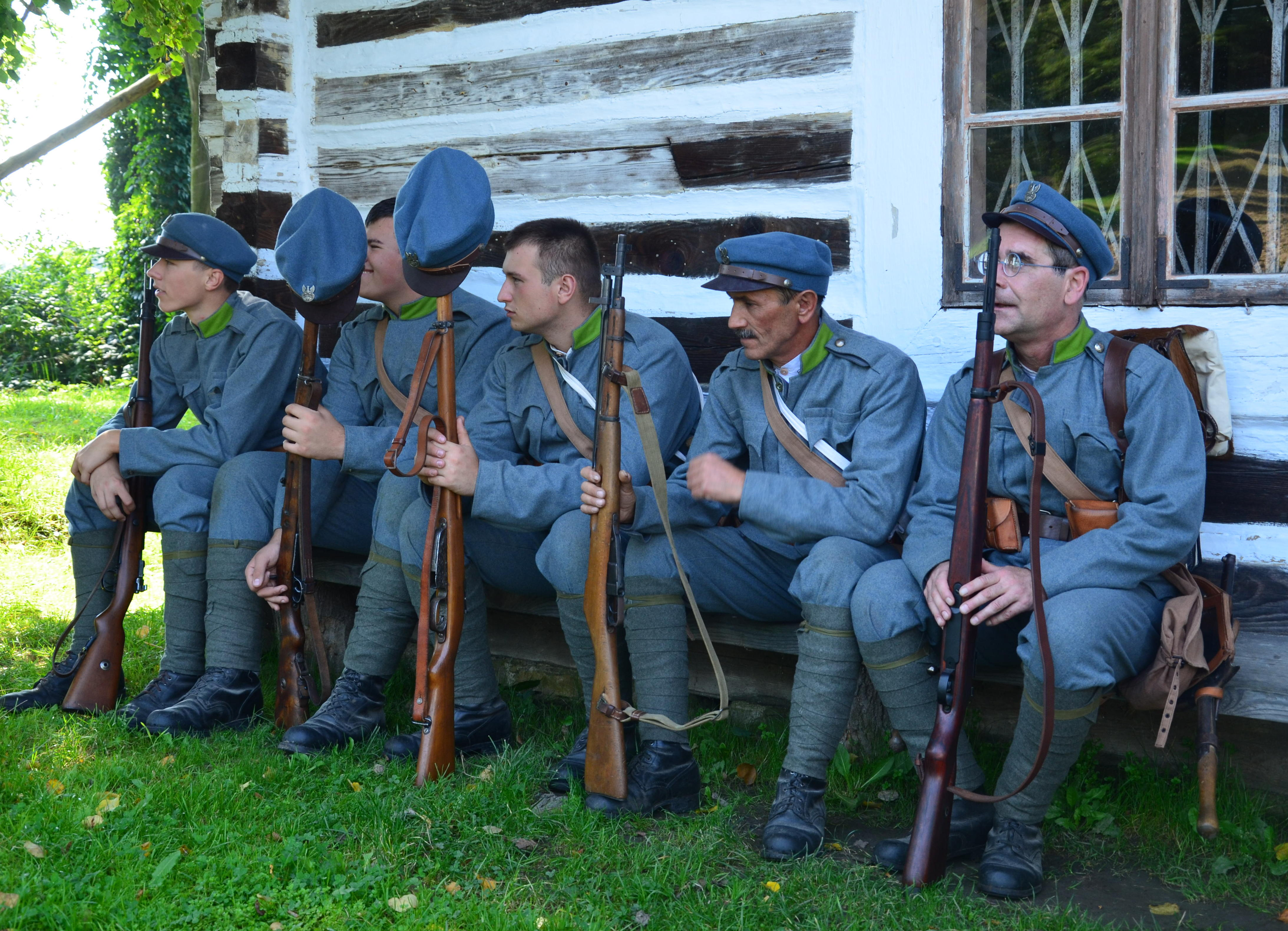 Die Einheit war eine unabhängige Formation der k.u.k. Armee und bestand anfangs aus zwei, später aus drei Brigaden.